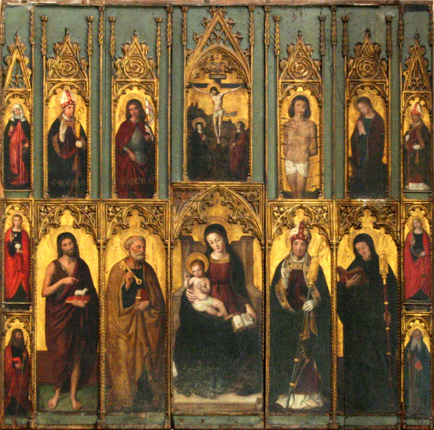 Polyptyque à seize compartiments. Ce polyptyque représente une Vierge à l'enfant entourée de saints honorés en Provence.